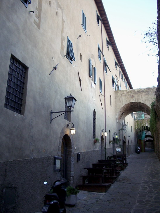 La facciata posteriore di Palazzo Camaiori a Castiglione della Pescaia